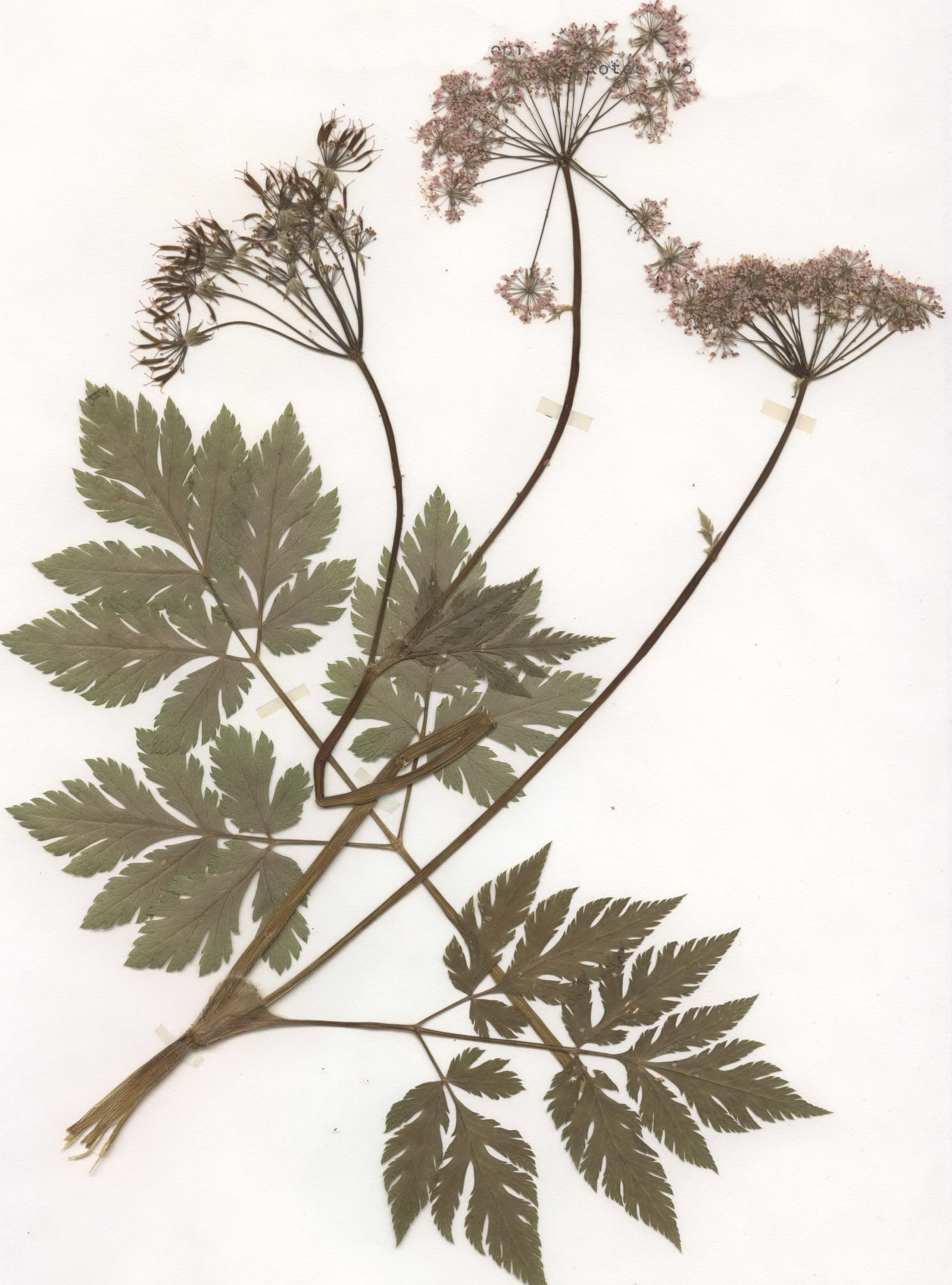 Chaerophyllum hirsutum, eigener Herbarbeleg von 1988, Unterfranken